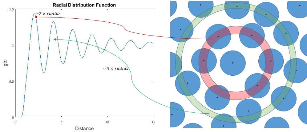 המחשה של פונקציית הסתברות רדיאלית עבור נוזל